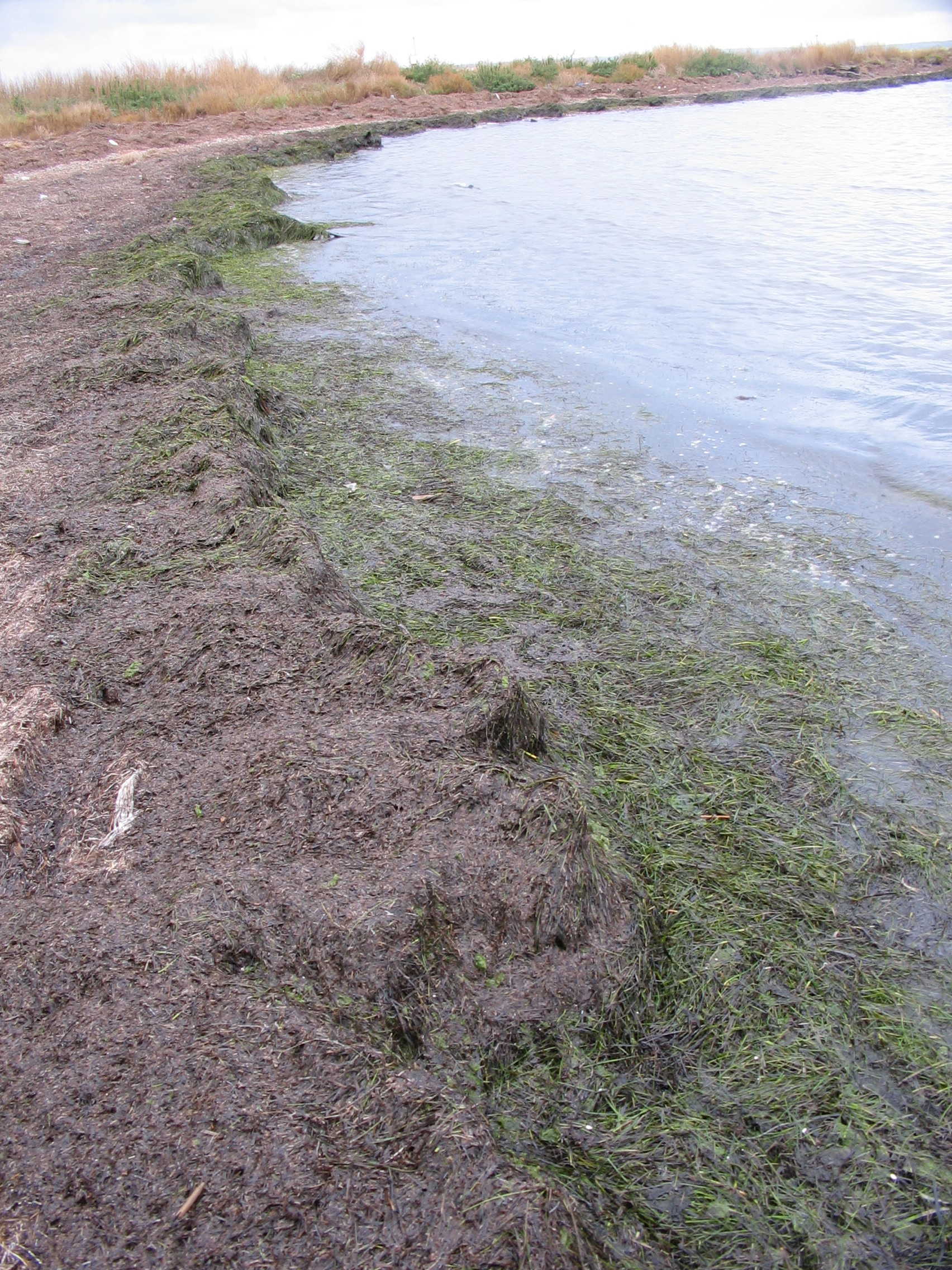 Mini-banquettes de Zostera noltii (Zostères naine) à Port Saint-Louis-du-Rhône (plage de Carteau). Elles sont similaires aux banquettes de Posidonies mais plus petites du fait de la taille réduite des feuilles.